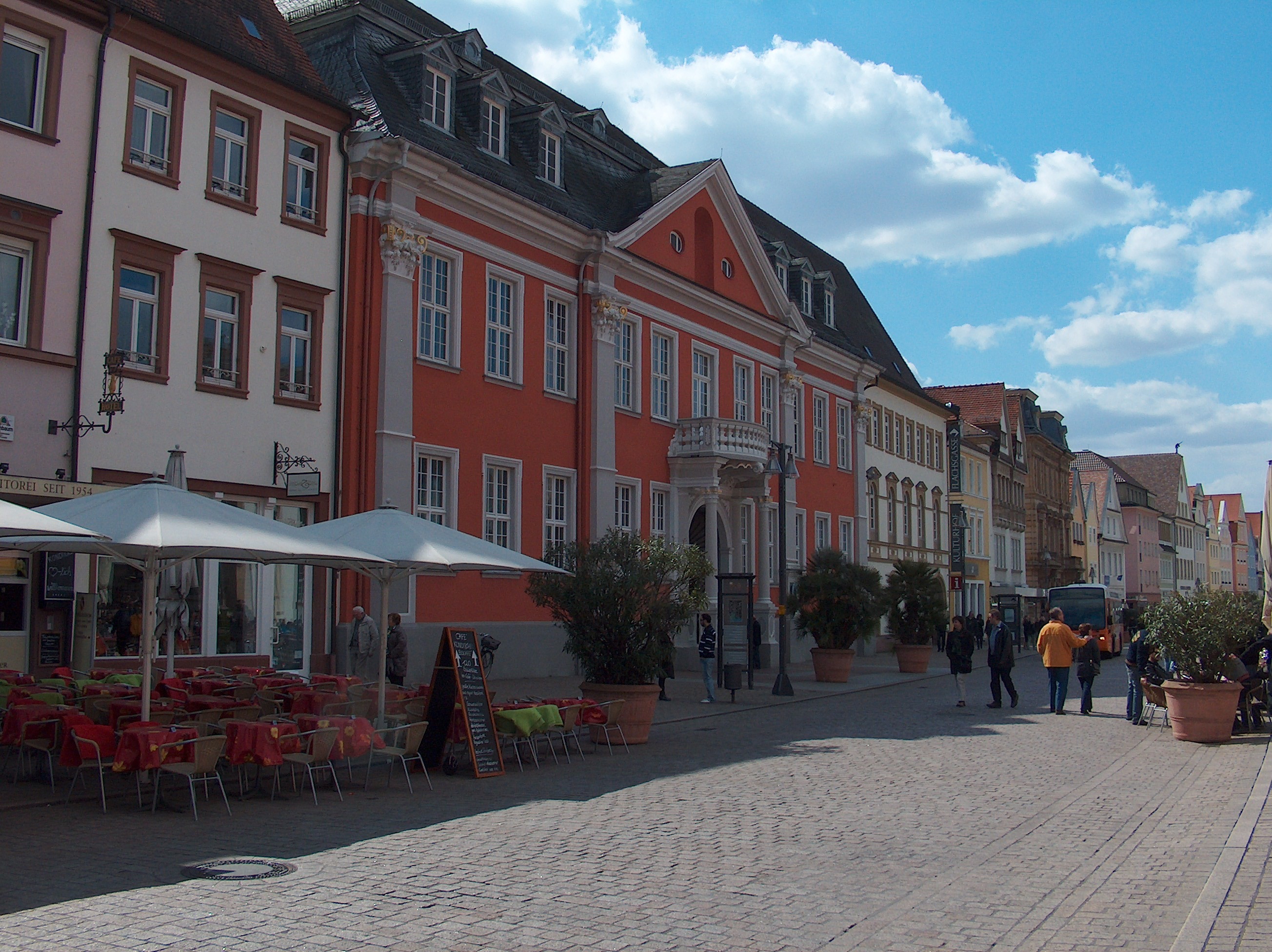 Historisches Haus in der Fußgängerzone von Speyer